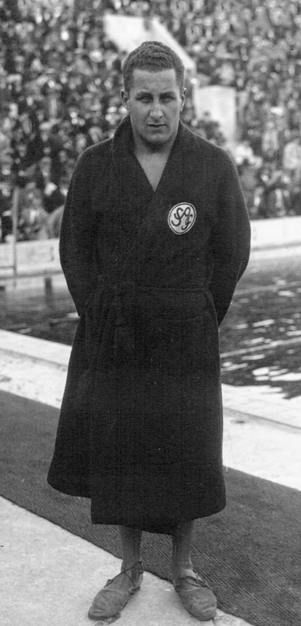 Tourelles, championnats de France de natation : Klein (portrait) : [photographie de presse] / Agence Meurisse